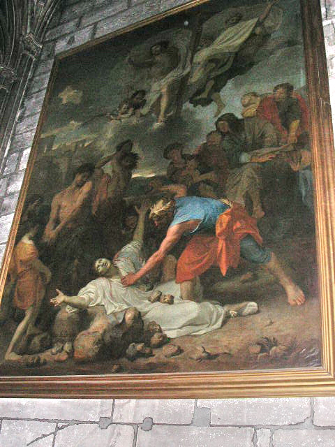 Notre-Dame de Paris : la lapidation de saint Etienne de Charles Lebrun